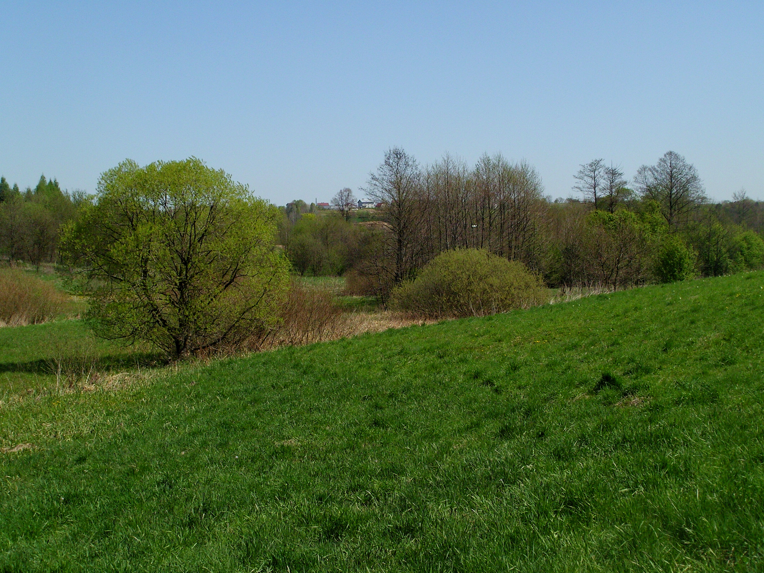 Wiosenna przyroda na pograniczu Bączala Dolnego i Bączala Górnego